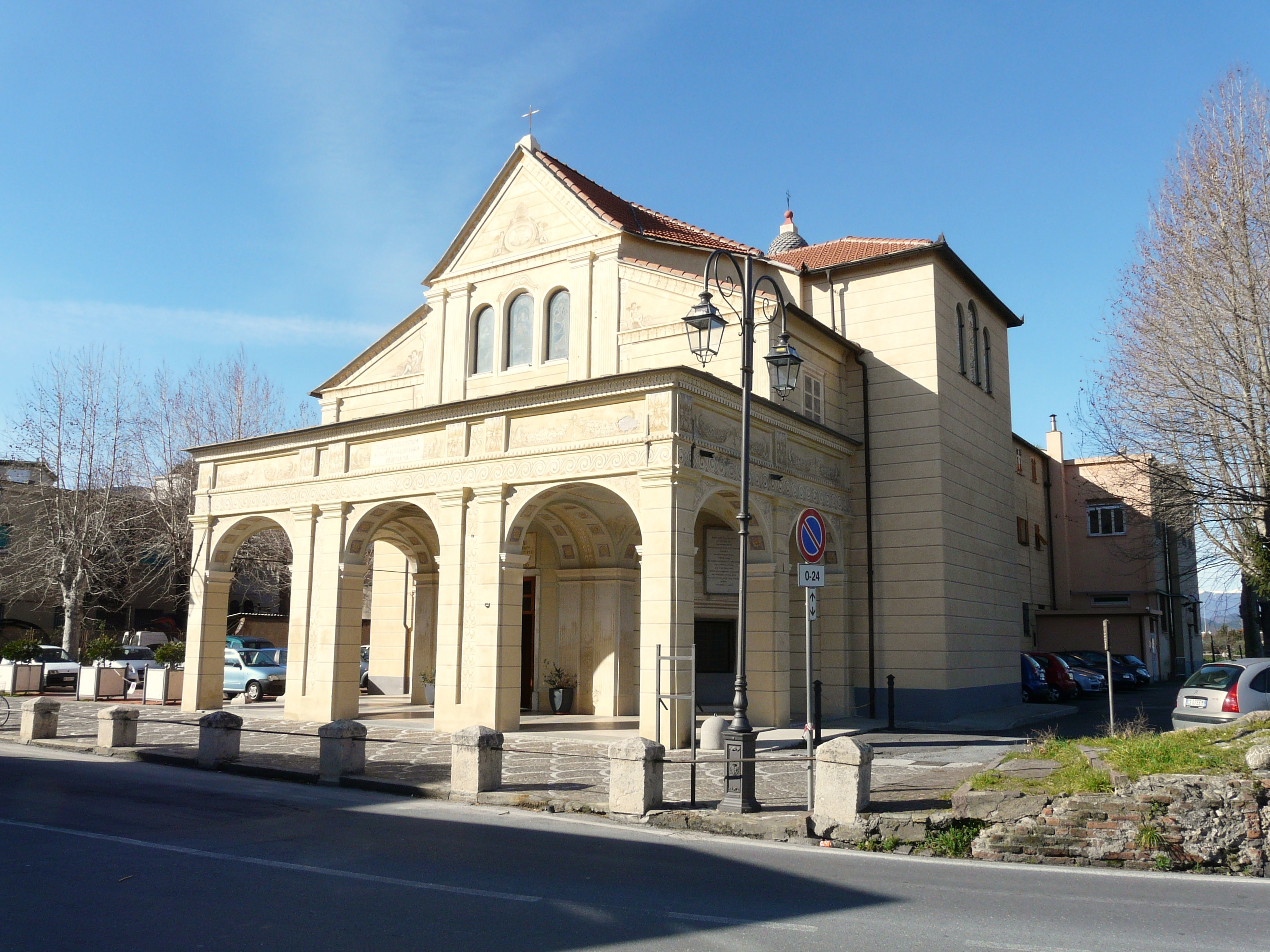 Santuario di Nostra Signora di Pontelungo, Albenga, Liguria, Italia